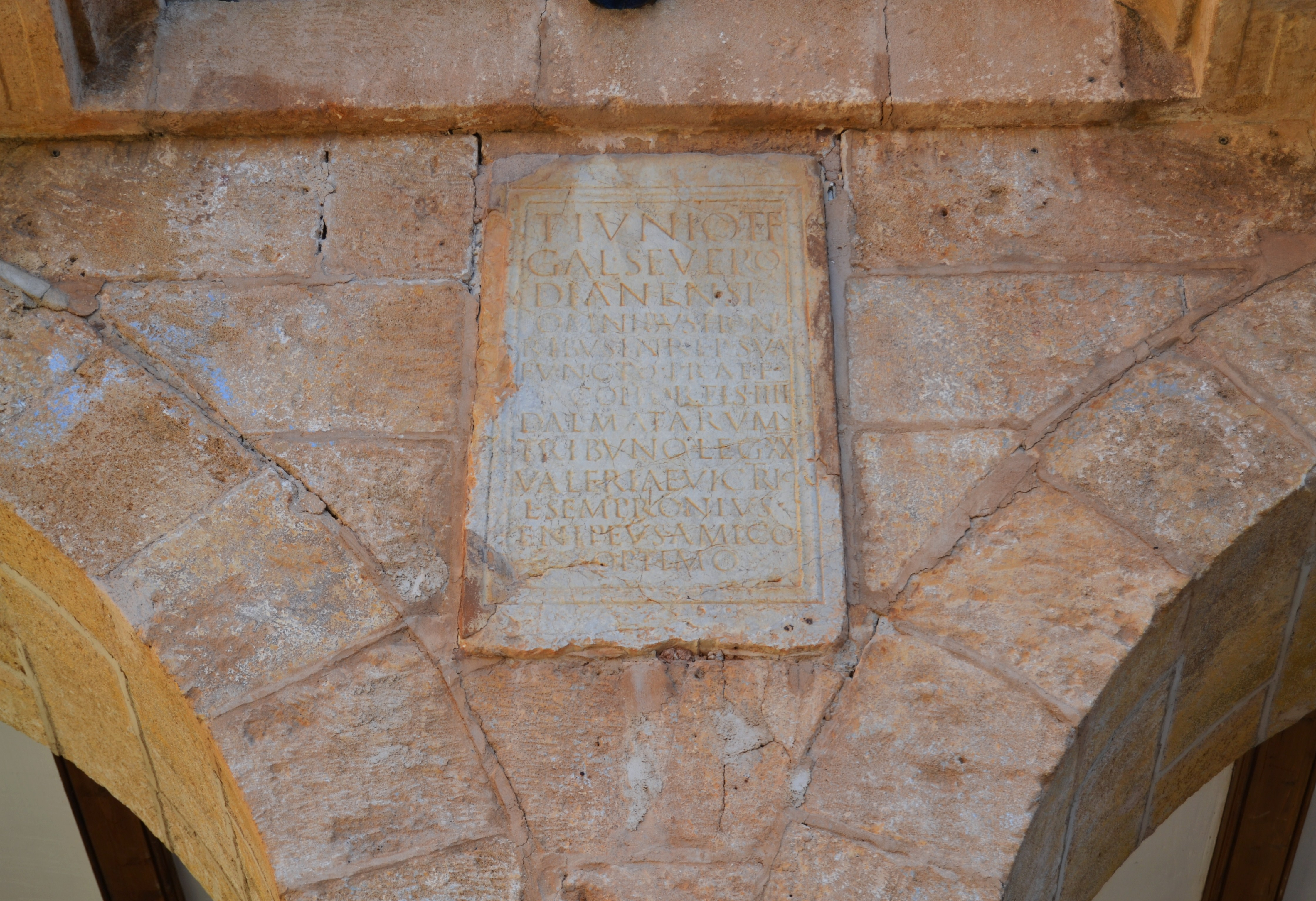 Inscripció romana a l'ajuntament de Dénia.